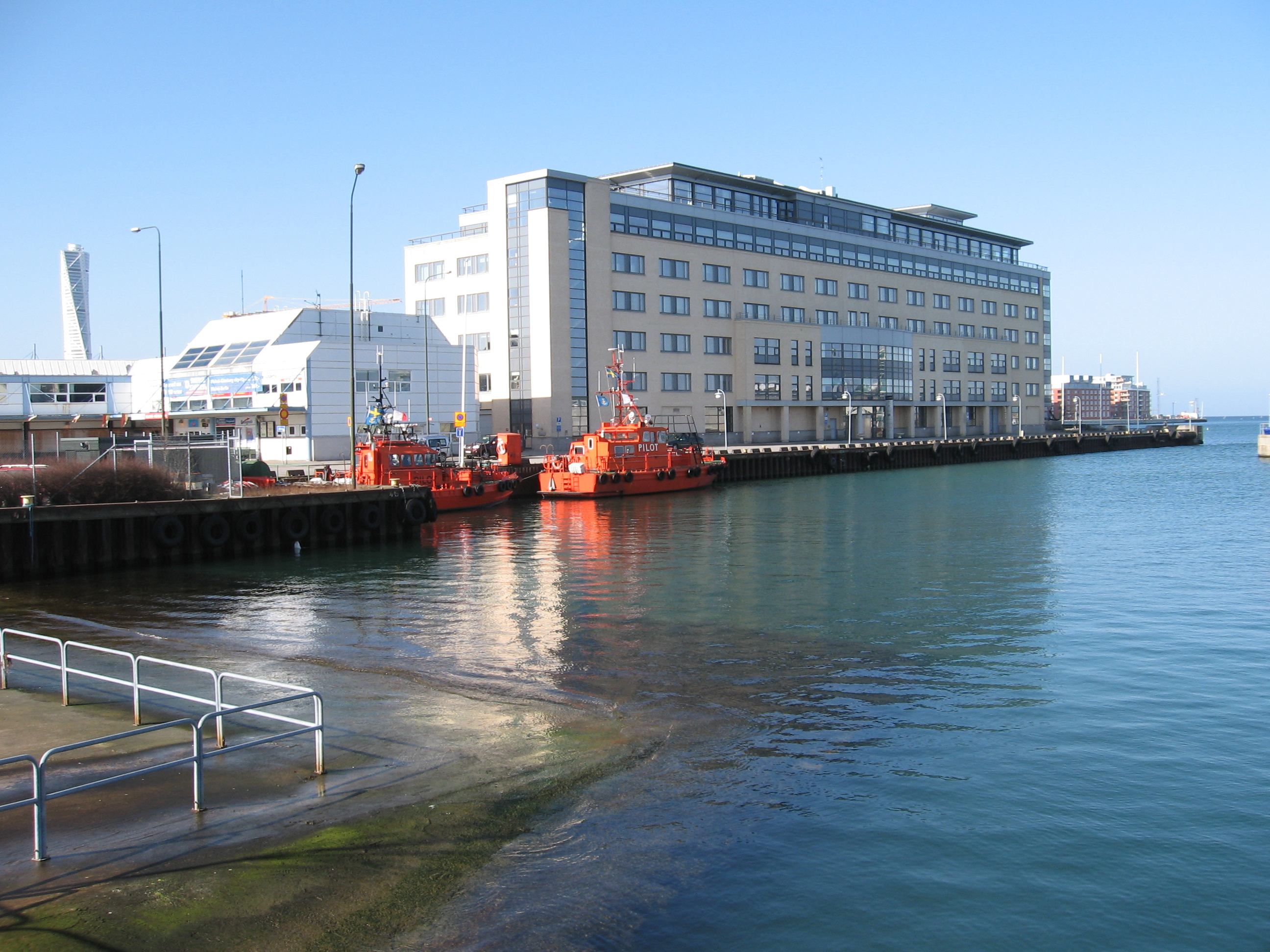 Lotsbåtar i Malmö